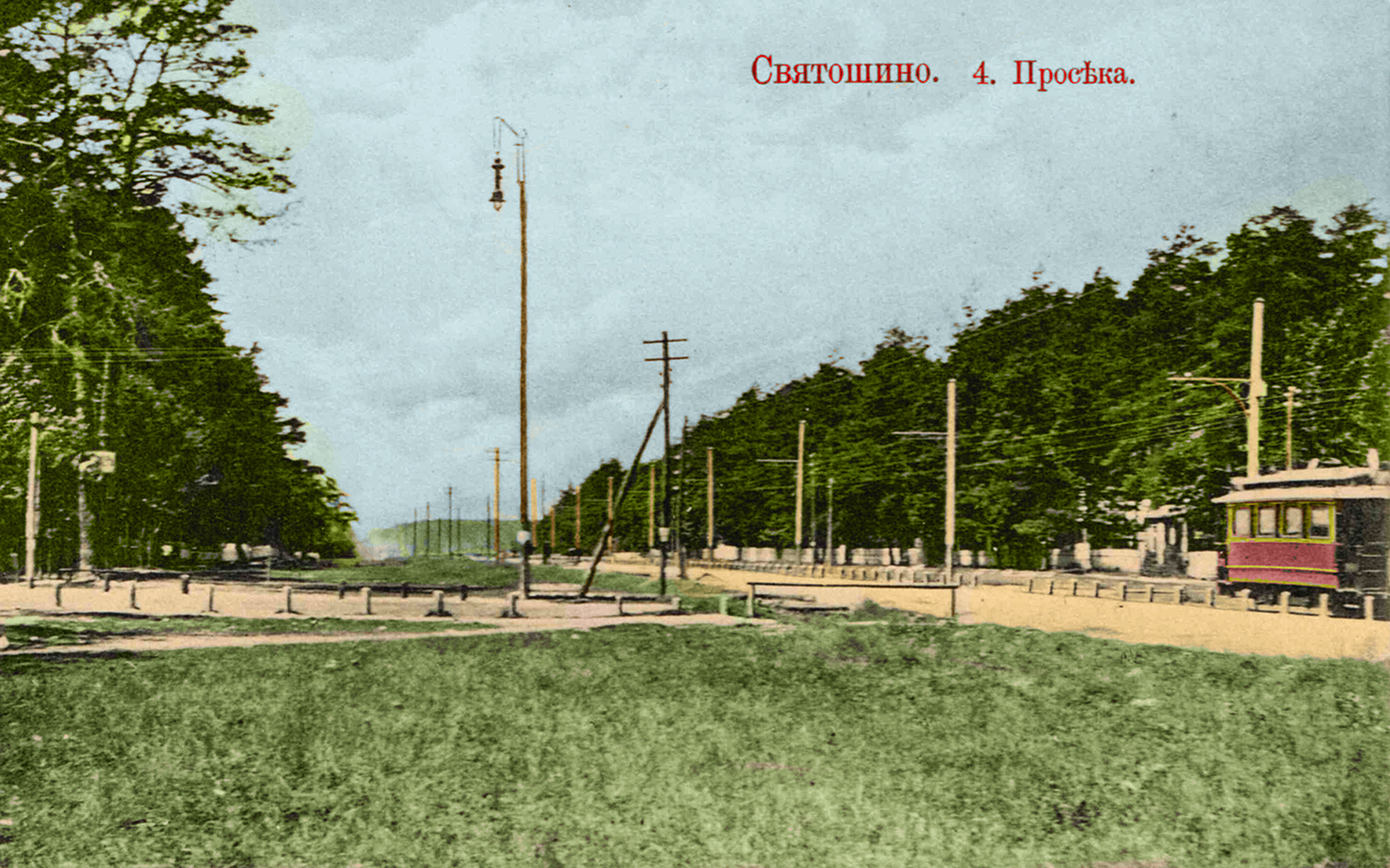 Святошинський трамвай. Святошин, 4 просіка.